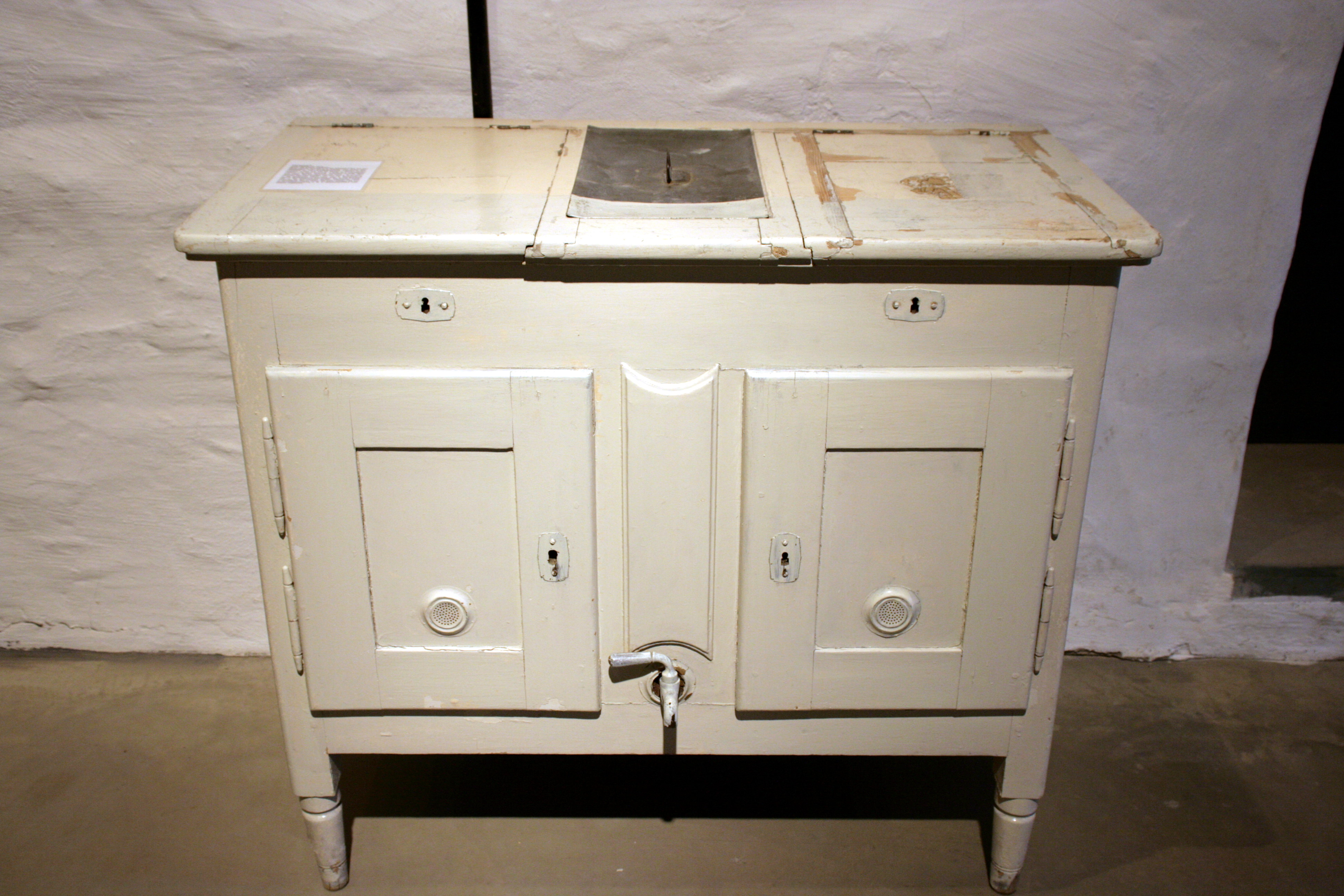 Museum Industriekultur in Osnabrück